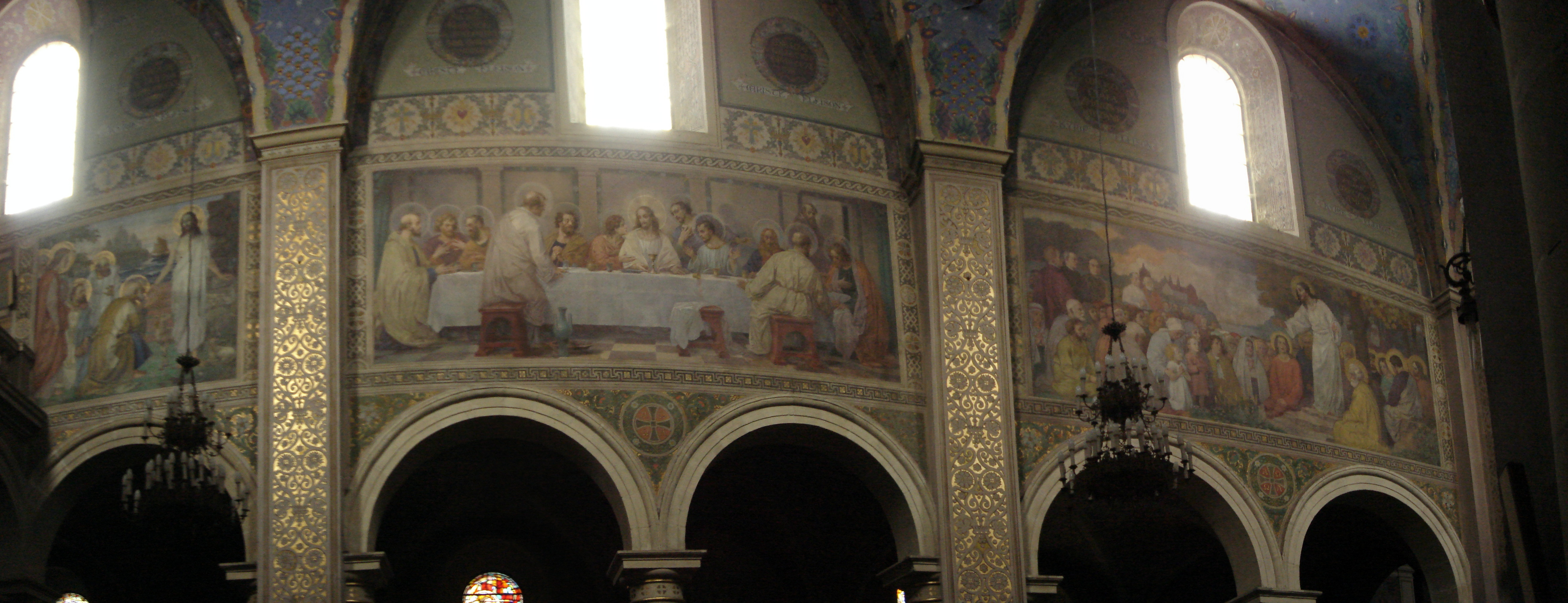 Bazylika katedralna Wniebowzięcia Najświętszej Maryi Panny w Płocku, Polichromie namalowane przez Władysława Drapiewskiego.